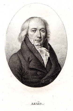 Pierre Hyacinthe Azais (1766-1845)